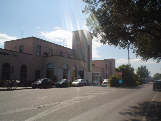 Facciata d'ingresso del fabbricato viaggiatori della stazione di Pesaro